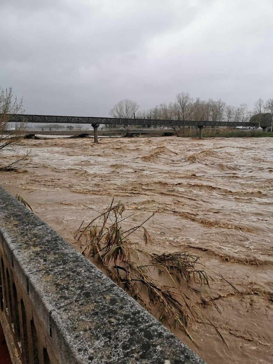 El riu Tordera a punt de desbordar-se al seu pas per Tordera durant el temporal Glòria de gener de 2020